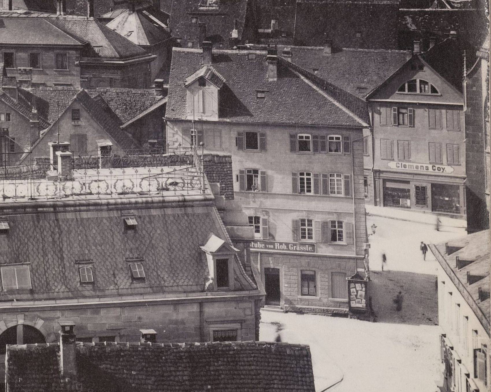 Blick vom Hafenmarktturm nach Süden über Heilbronn. Ganz rechts ein kleiner Teil der Kilianskirche, links neben der Kilianskirche das Haus des Bäckermeisters Gräßle, der Treffpunkt der Gräßle-Gesellschaft. Das Haus wurde im Januar 1897 von der Stadt Heilbronn erworben und wenig später abgerissen.